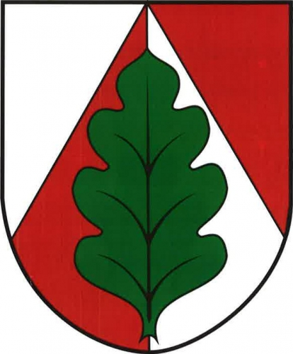 znak, Panské Dubenky, okres Jihlava